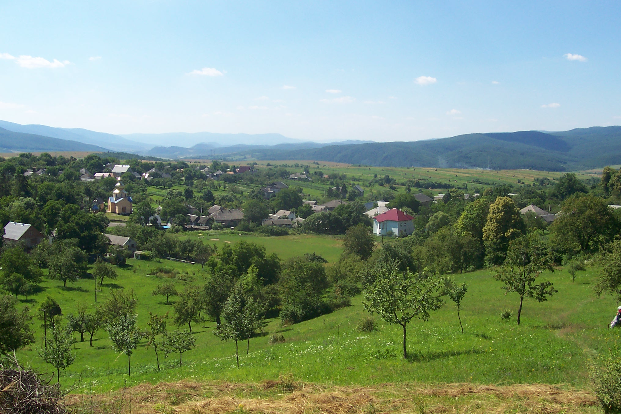 Turja-Sebes